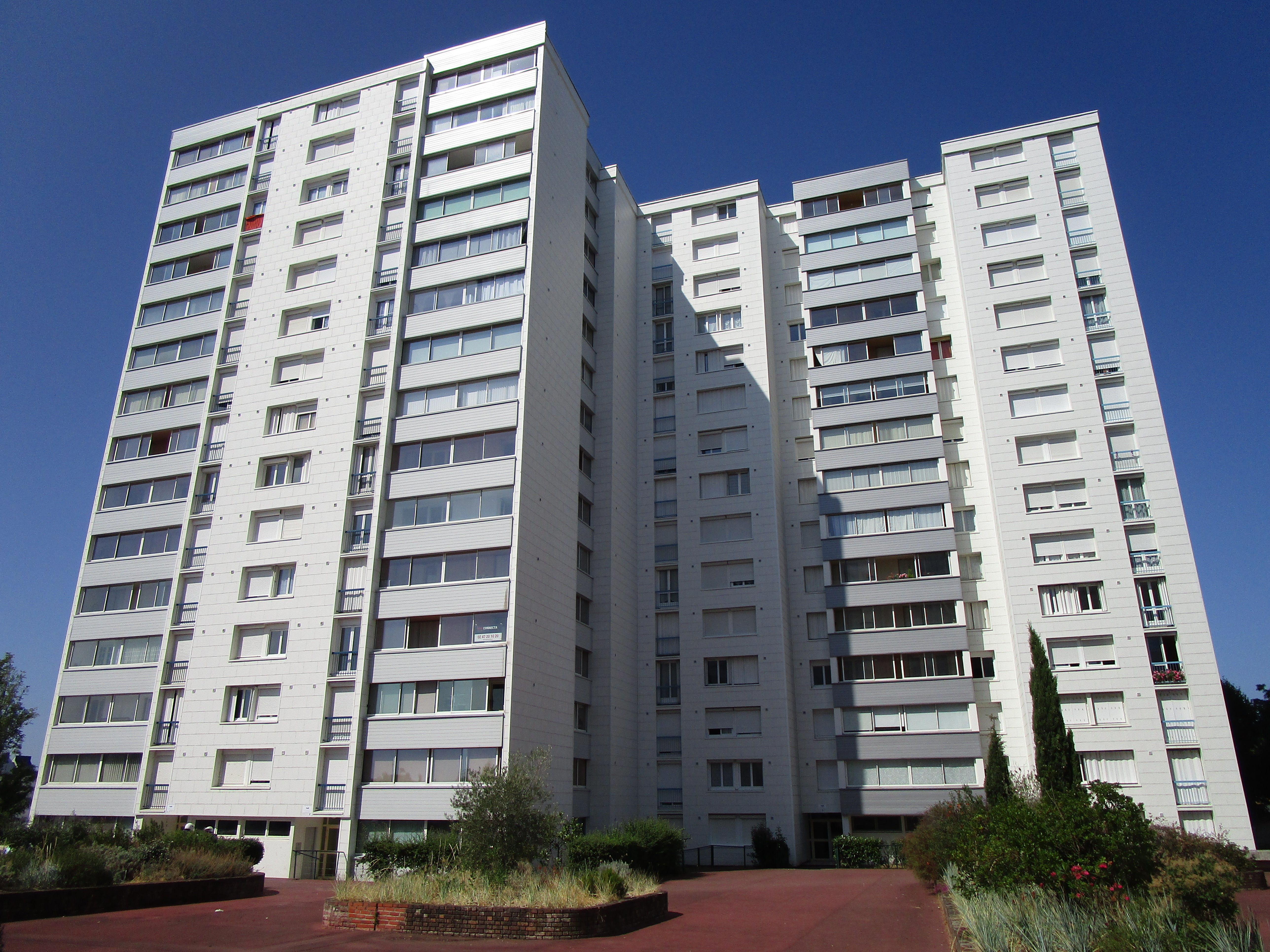 Tours de la résidence de Grand Mail, quartier de la Rabaterie, à Saint-Pierre-des-Corps